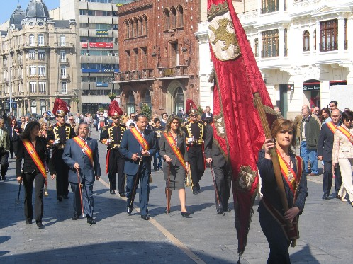 Comitiva municipal de León (España) dirigiéndose a la Basílica de San Isidoro para la celebración de las Cabezadas en el año 2006.